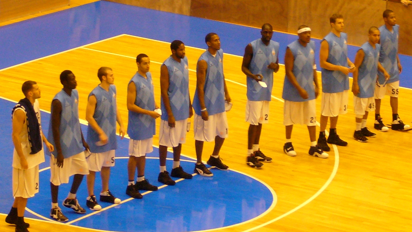 L'équipe Euroleague de la Chorale de Roanne avant le match aller contre le Fenerbace Ulker (à Clermont-Ferrand)